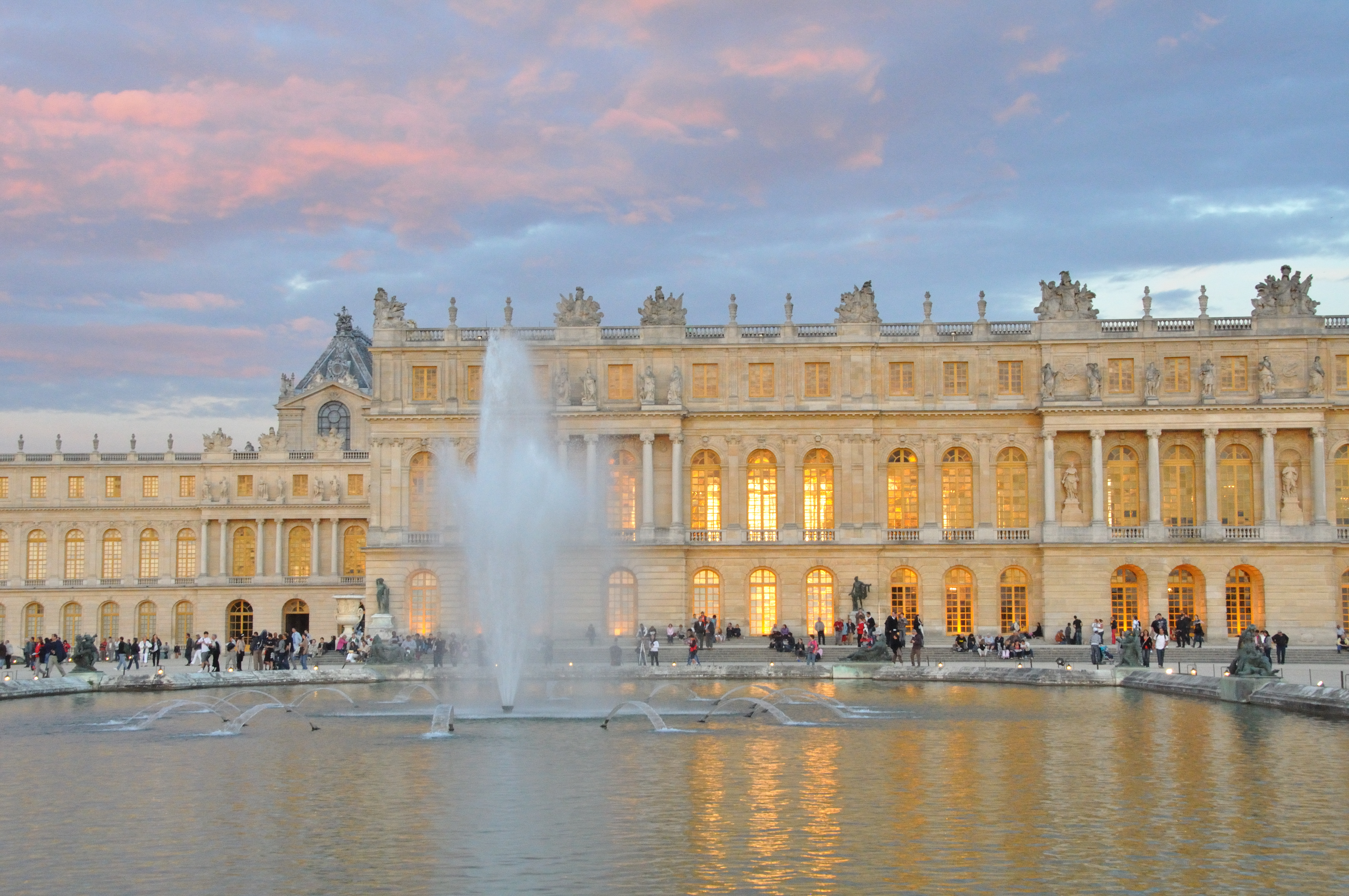 Coucher de soleil sur le Chateau de Versailles, France.